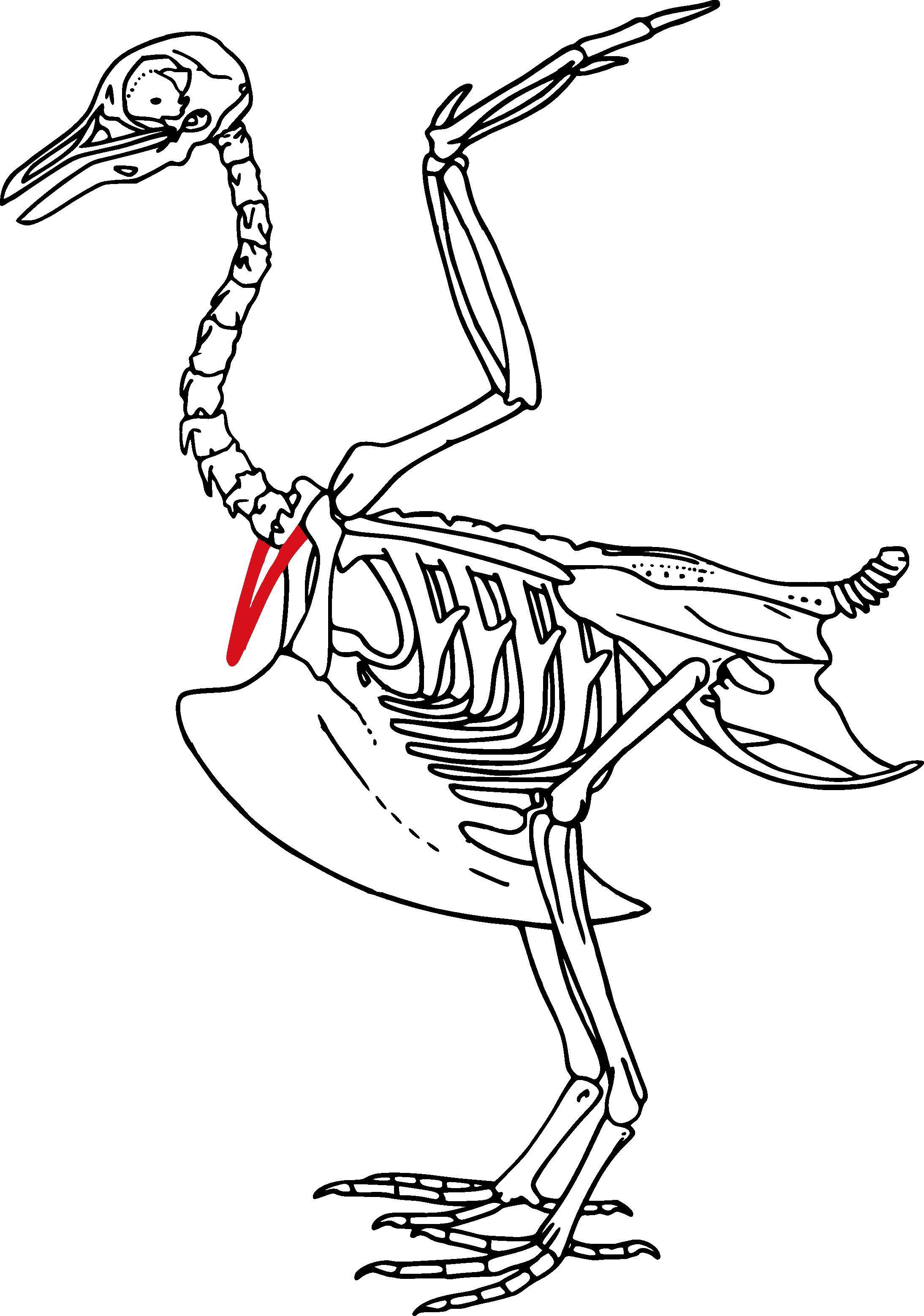 furcula